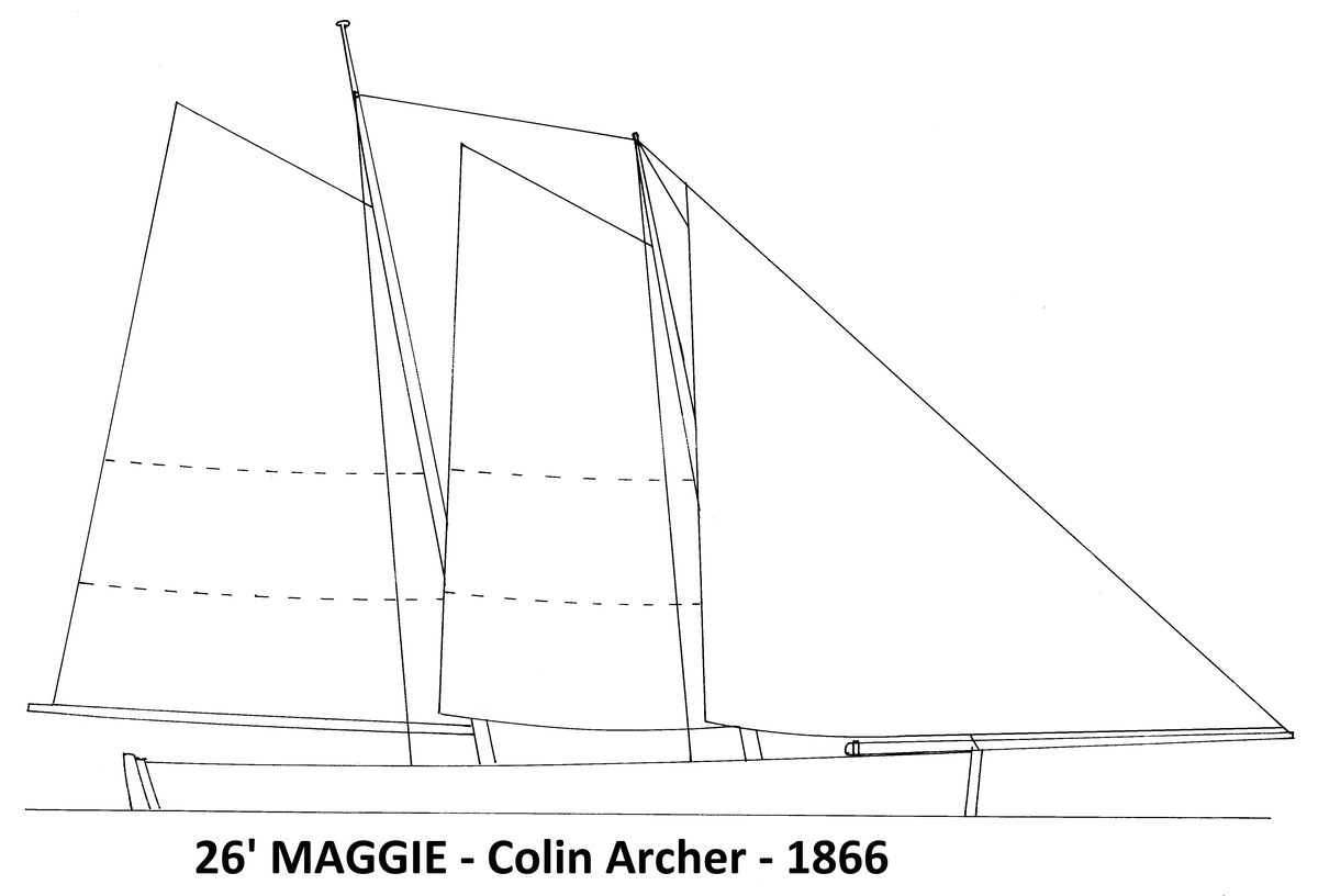 Colin Archers første seilbåt, sjøsatt 1867, her med storklyver som på et fotografi samme året.